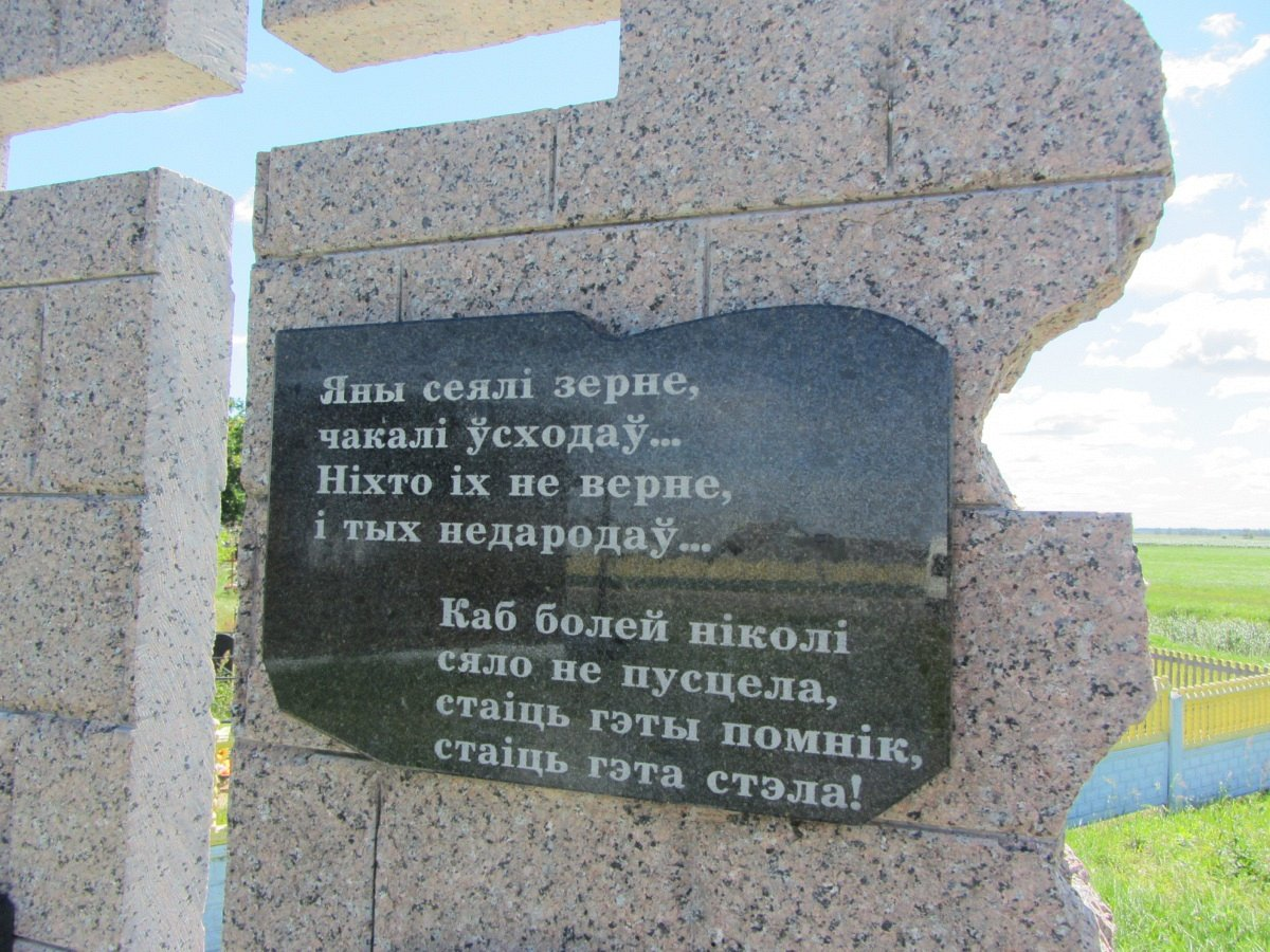 Хільчыцы. Помнік ахвярам рэпрэсій